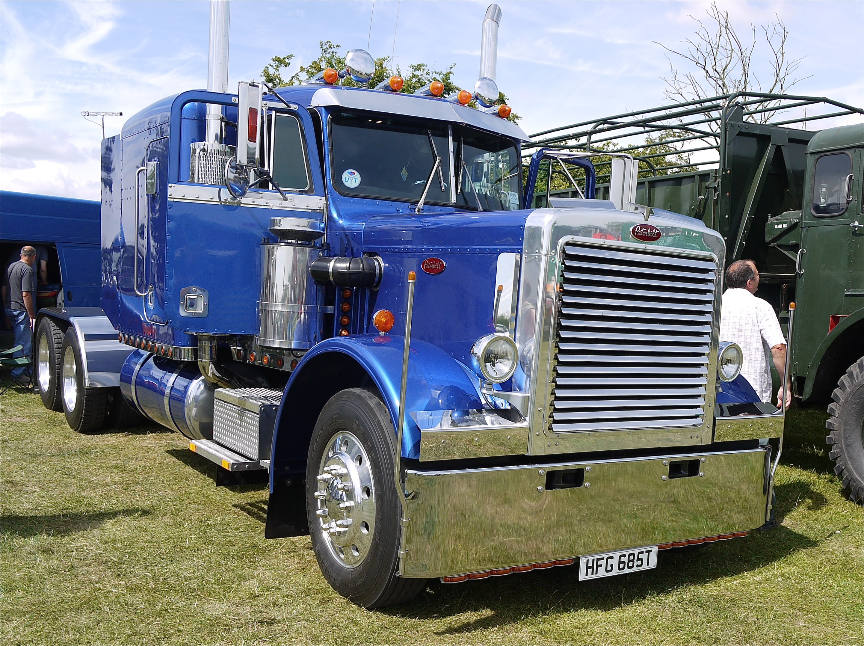 Panasonic G1 14-45 Lens